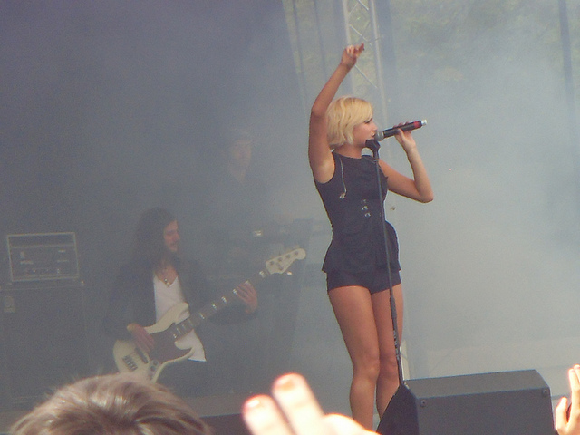 Pixie Lott cantando "All About Tonight" no festival estabelecido no Hanley Park, na cidade de Stoke-on-Trent, Inglaterra, em 16 de julho de 2011.